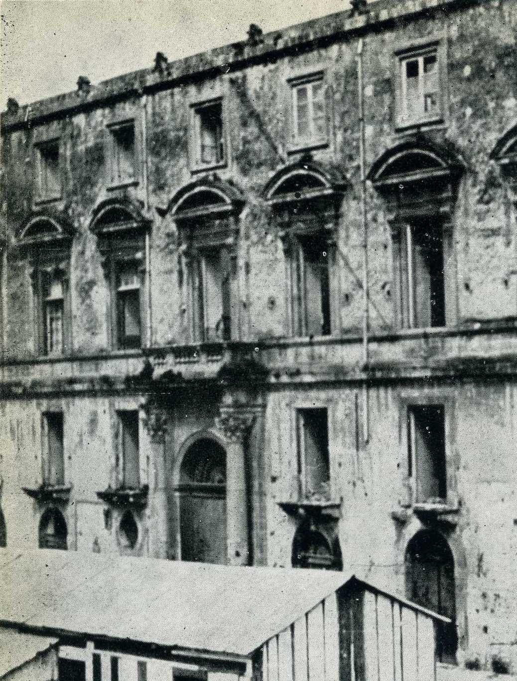 palace